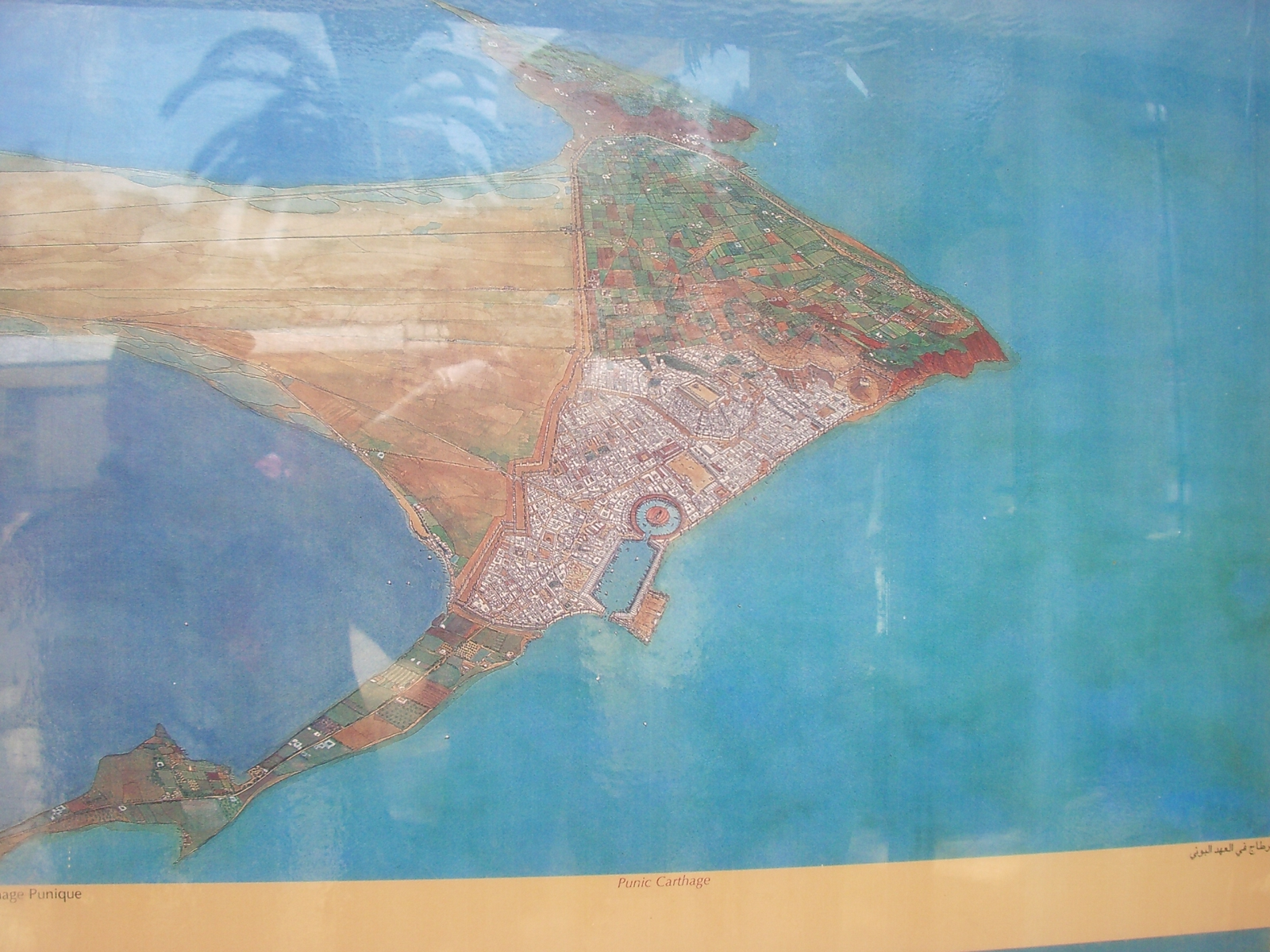 reconstrucció del port púnic